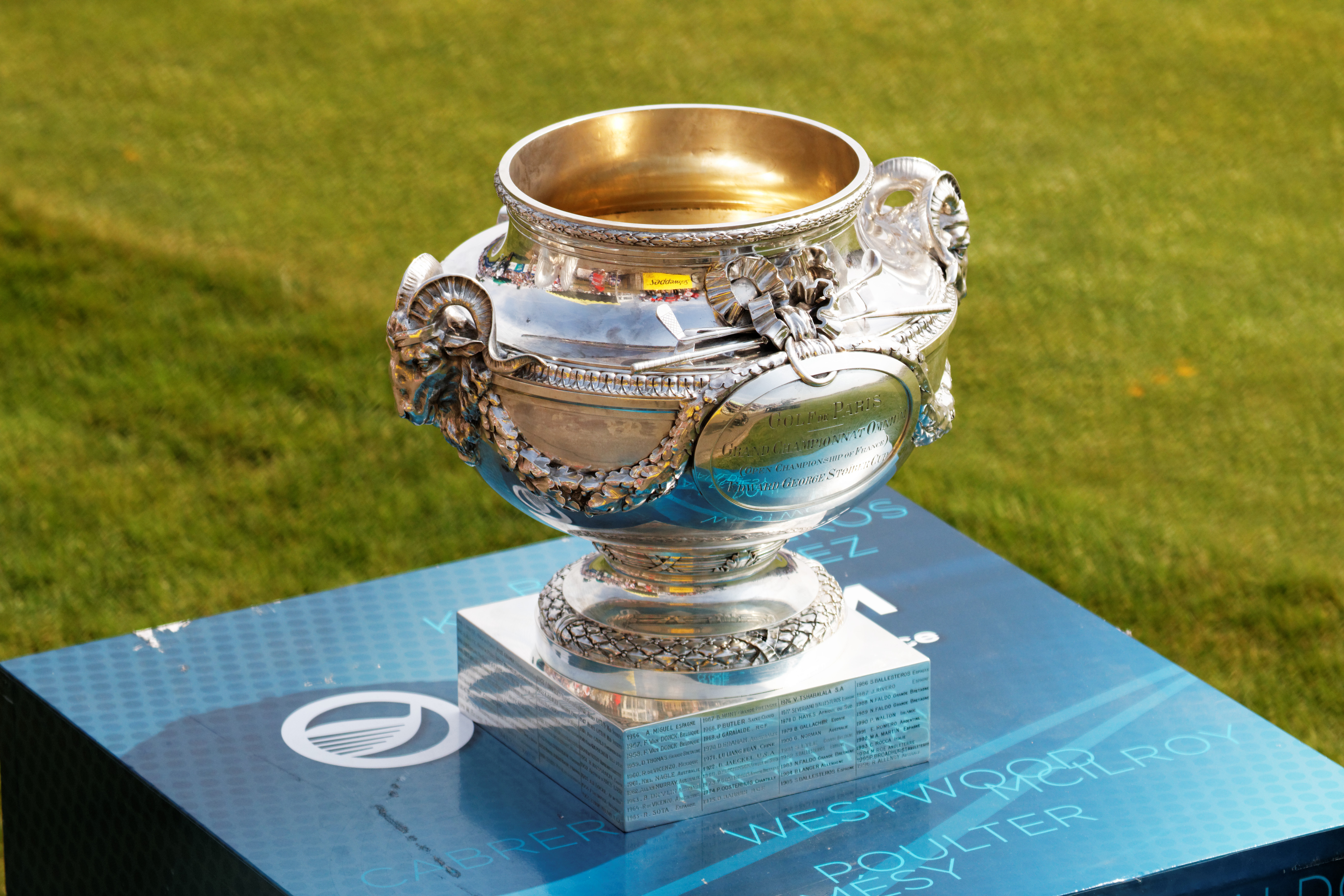 photo prise lors de l'Alstom - Open de France de Golf 2015